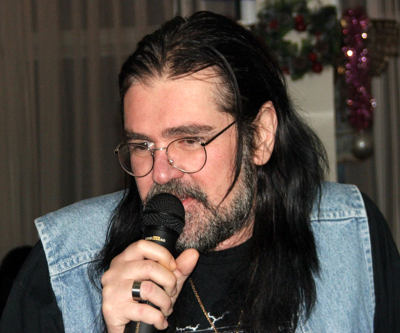 Чочо Владовски 16.12.2005 г.